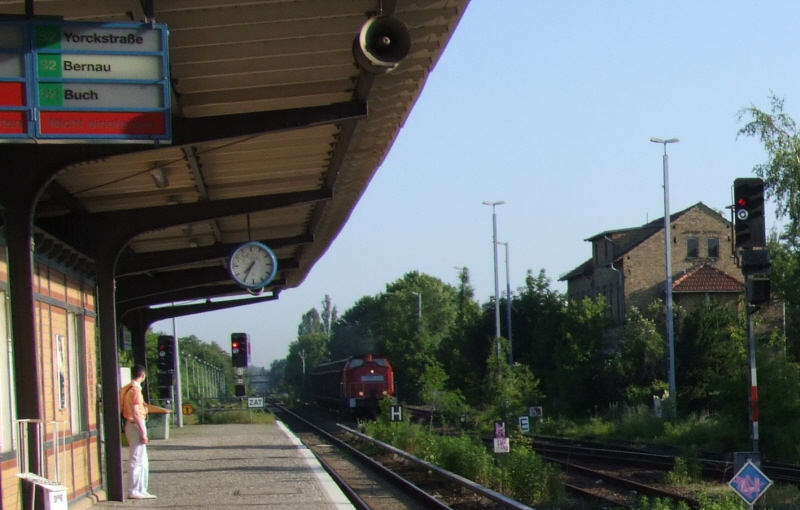 eines Güterzuges in den Bahnhof Berlin-Marienfelde von Norden